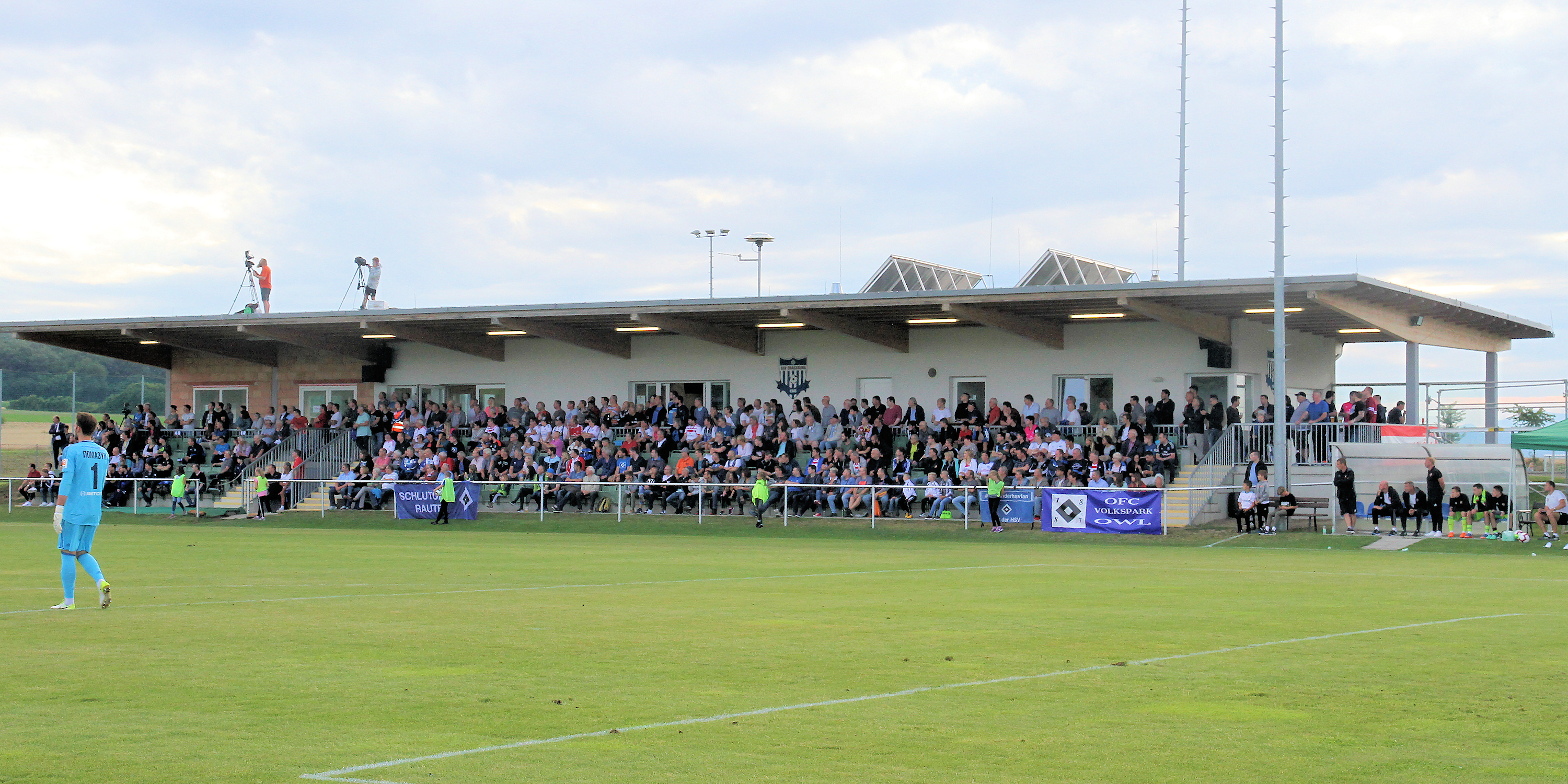 Meisterschaftsspiel der Landesliga Burgenland 2018/19 ASV Draßburg (rote Trikots) vs. SC Ritzing (schwarze Trikots) 2:3 (0:3) am 1. Juni 2019 in Draßburg. – Das Bild zeigt Sportanlage des ASV Draßburg.